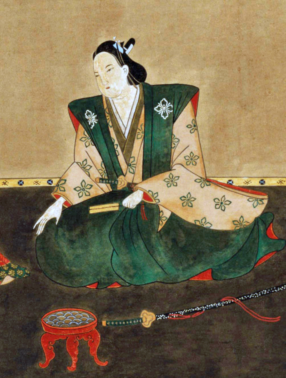 武田信勝像、 原典は和歌山県高野山持明院所蔵の一部。